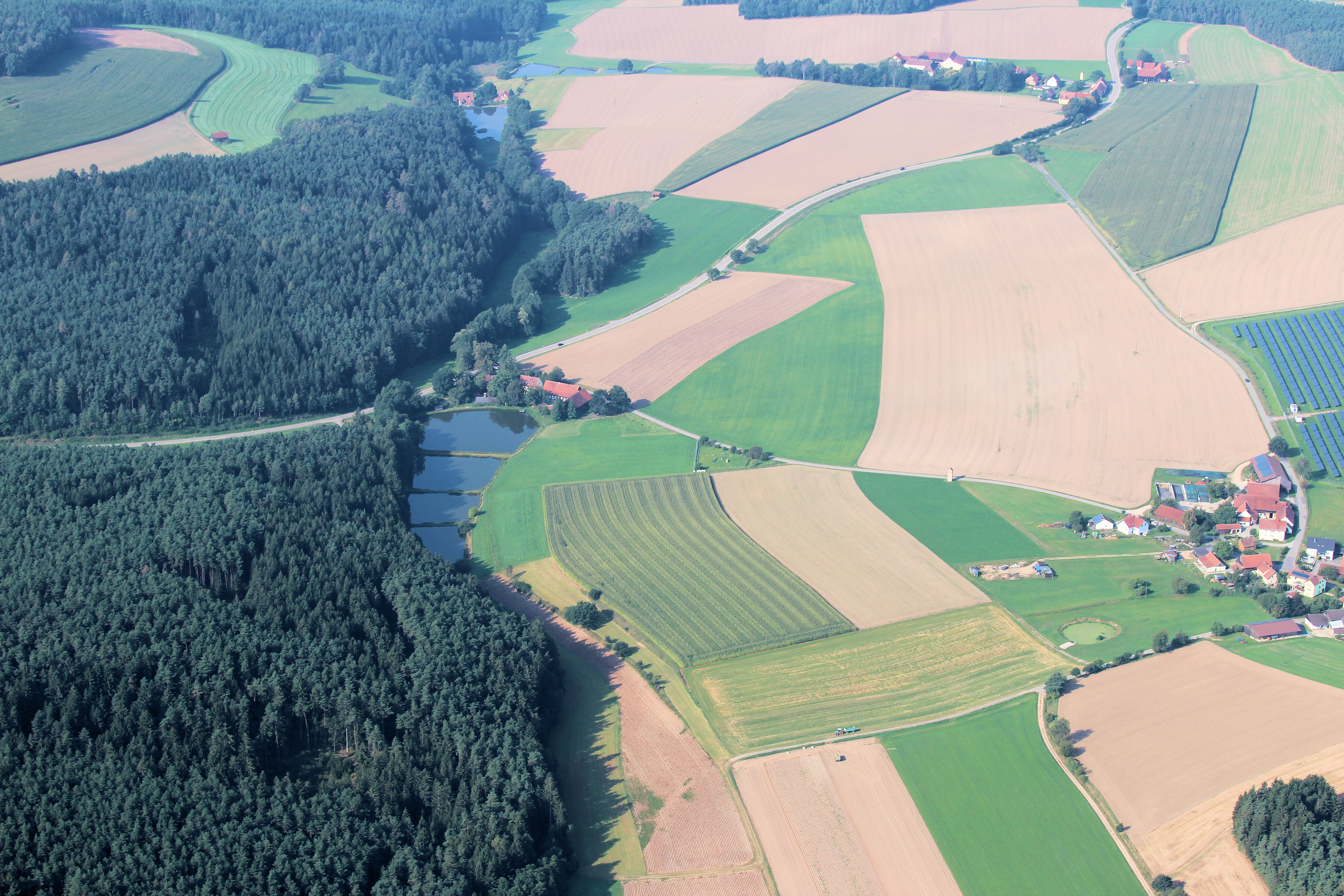 Eckendorf (rechter Bildrand), Kumpfmühle (Bildmitte links), Bärnmühle (oben links) und Höflarn (oben rechts); Stadt Nabburg, Landkreis Schwandorf, Oberpfalz, Bayern